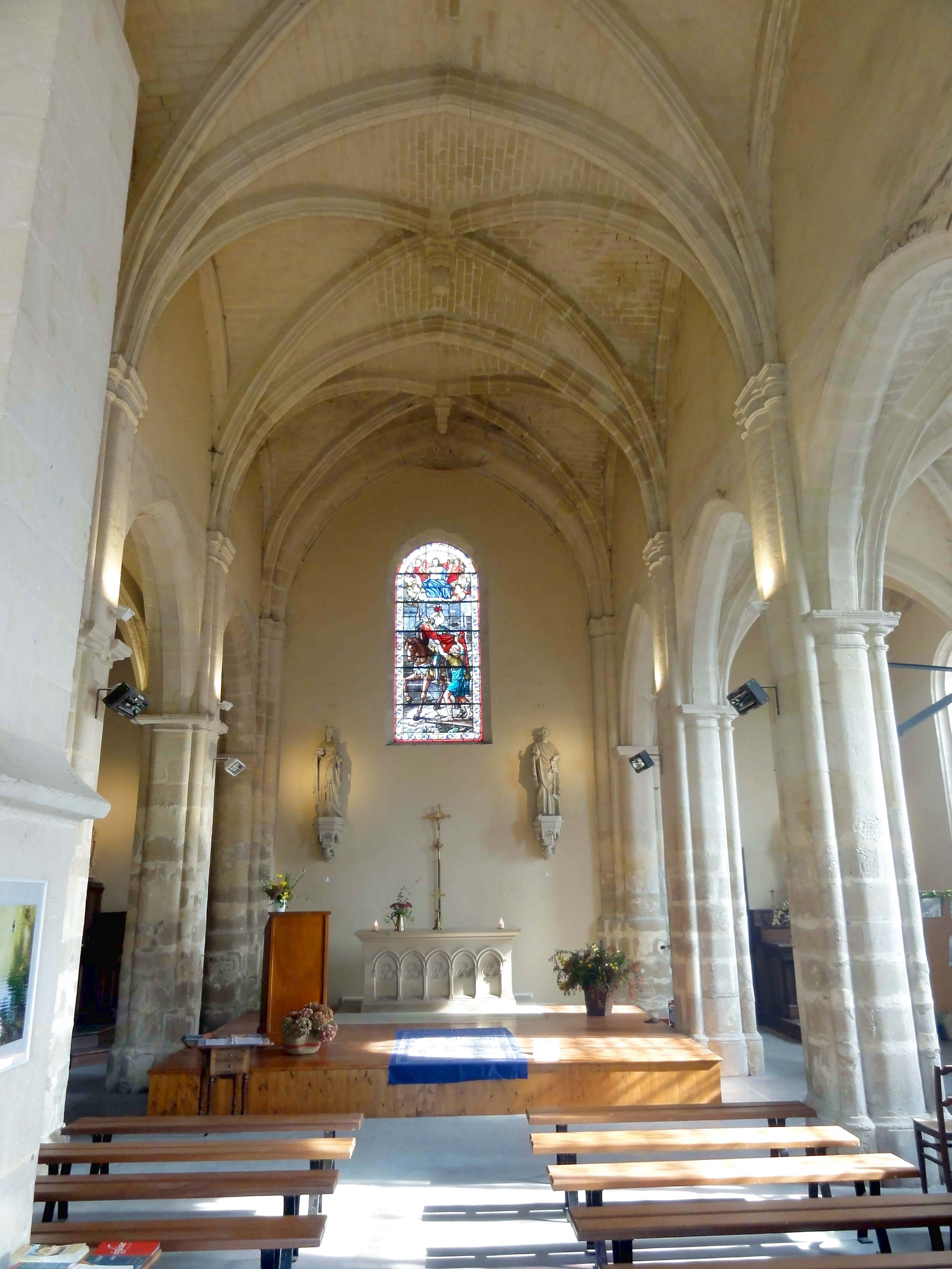 Intérieur de l'église - voir titre.